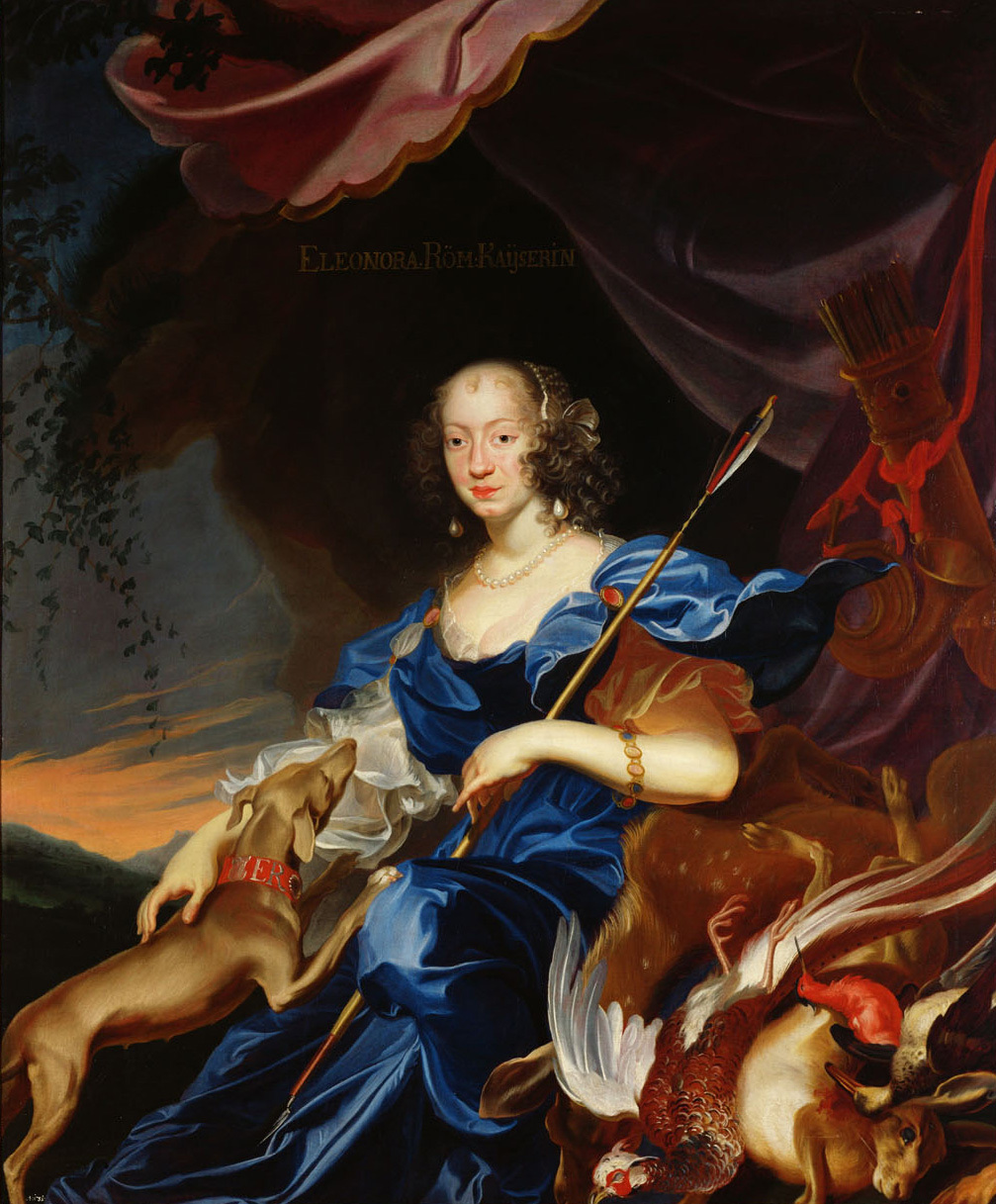 Eleonore ist als Jagdgöttin Diana mit einem Windhund, Pfeilen und Bogen und einem Jagdhorn im Hintergrund dargestellt. Rechts unten befinden sich in Form eines Jagdstillebens ein Damtier, ein Feldhase, ein Fasan, eine männliche Pfuhlschnepfe und eine Kolbenente.